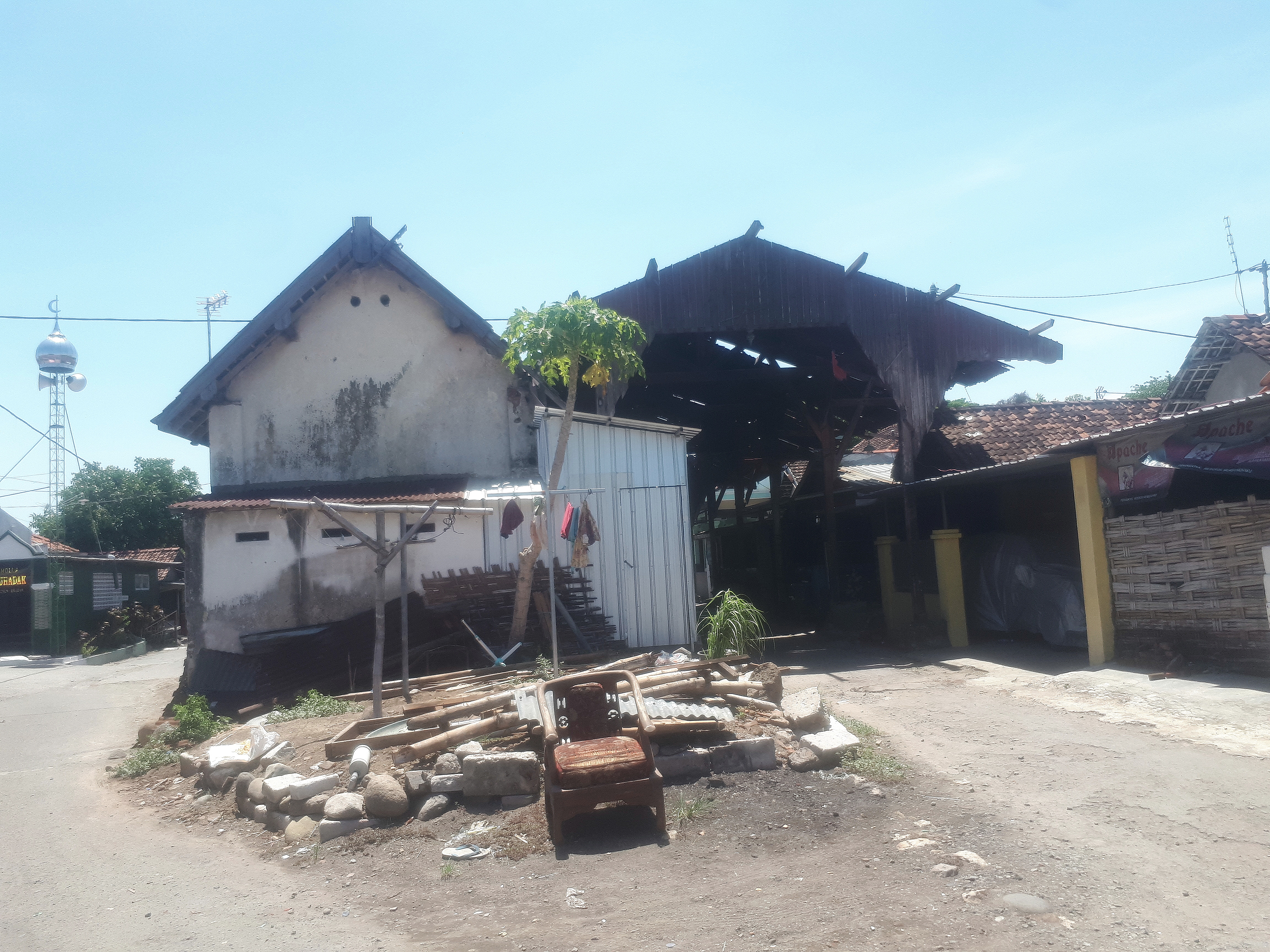 Tampak samping dan kanopi Stasiun Lespadangan yang terletak di Kabupaten Mojokerto. Kini digunakan sebagai hunian warga sekitar, 2020